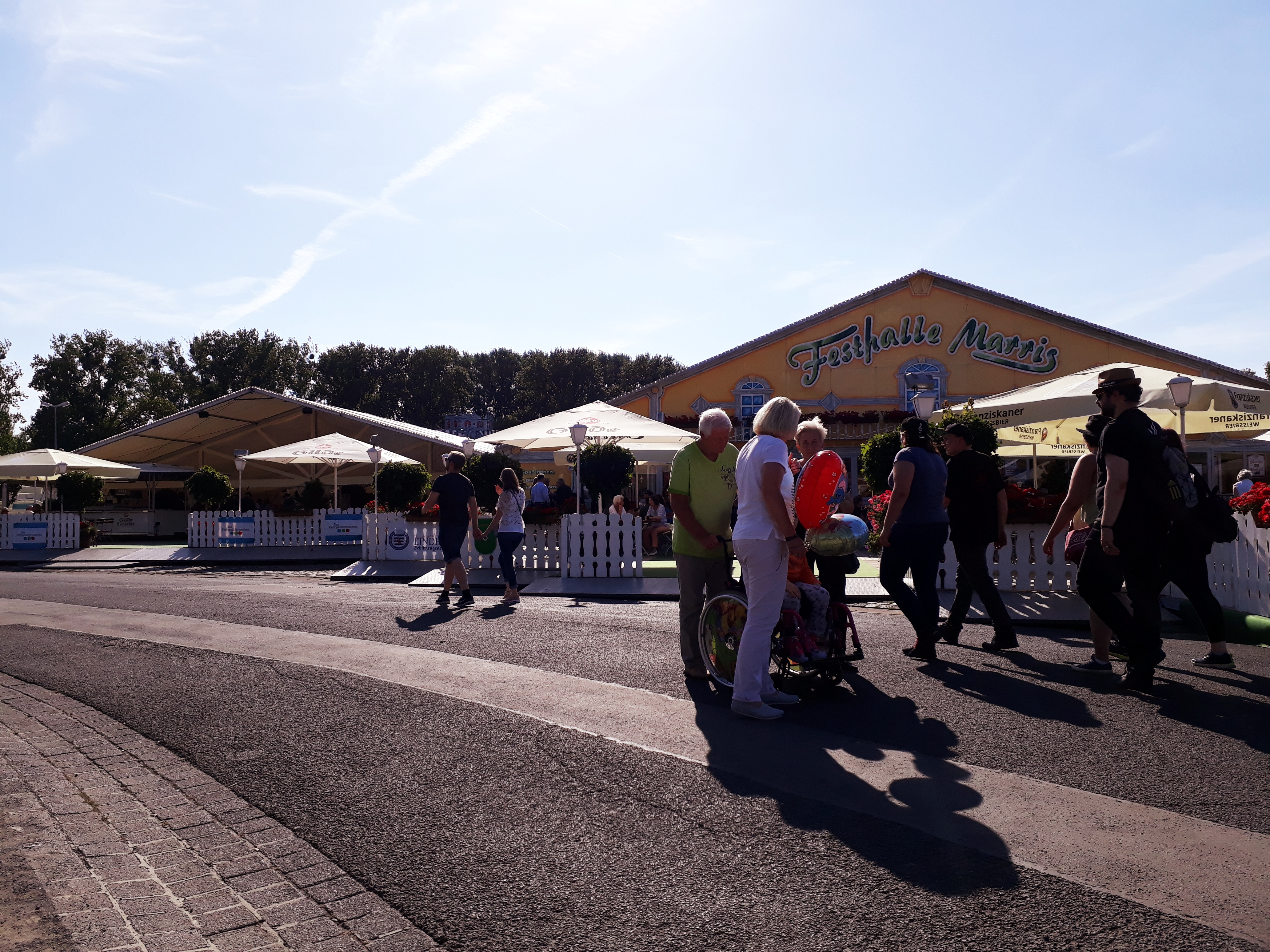 Festhalle Marris (Haupt- und Nebenflügel) auf dem Schützenfest Hannover 2018.